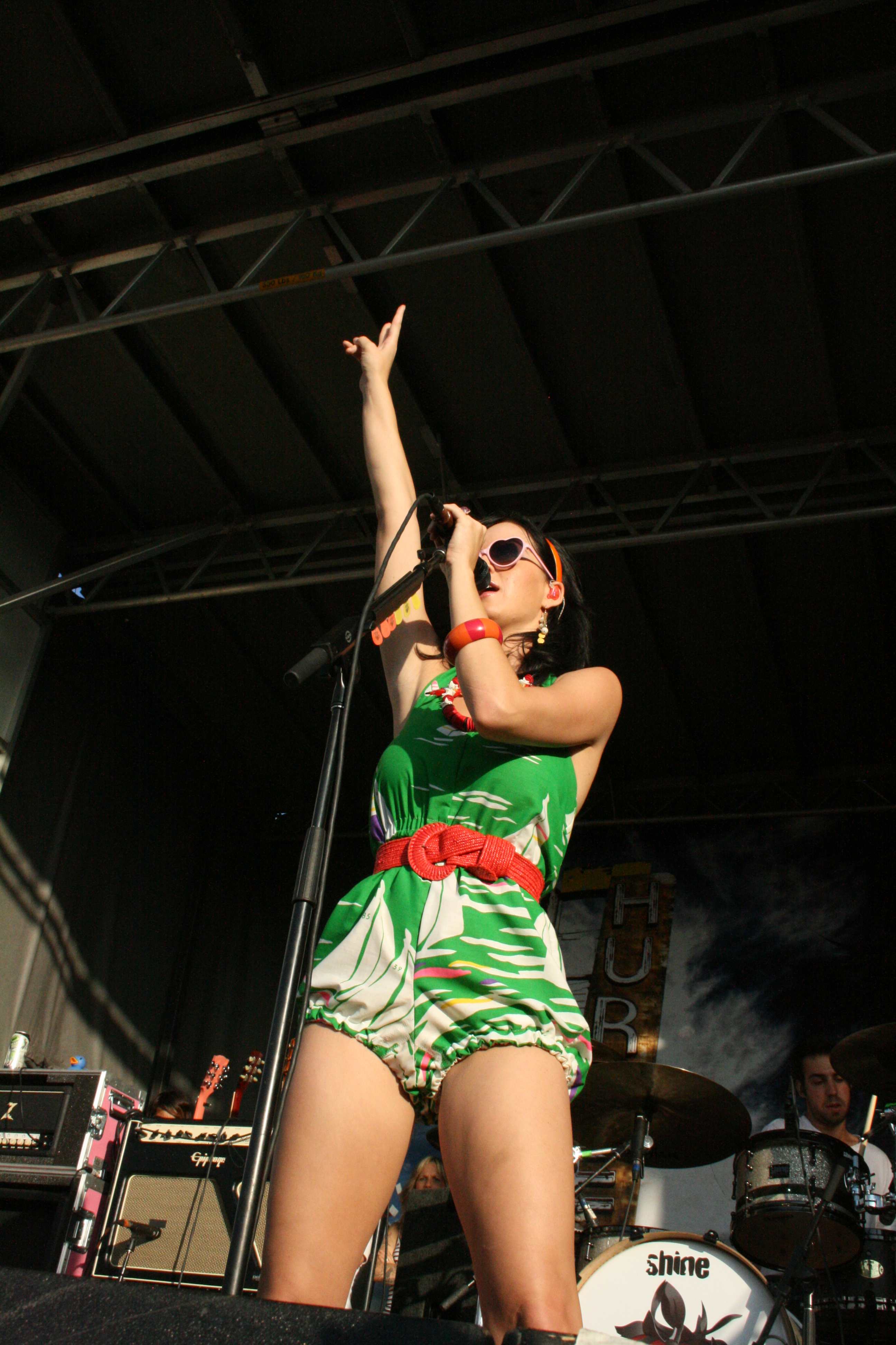 Katy Perry em Warped Tour 2008. A cantora busca vestir trajes com estilo retrô, conhecidos como vintage e também usa vestimentos estranhos como o óculos da foto.